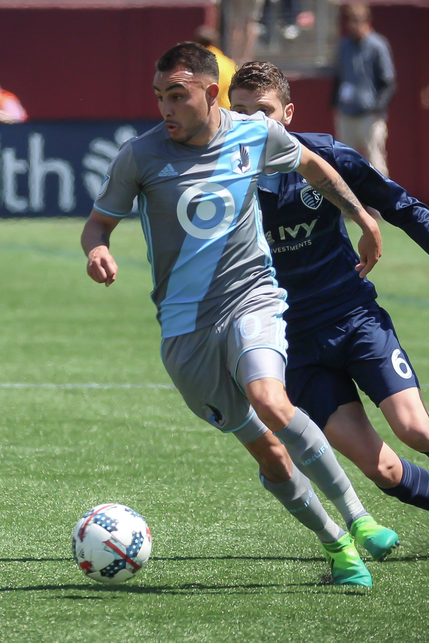 Miguel Ibarra - Minnesota United - MLS - Soccer